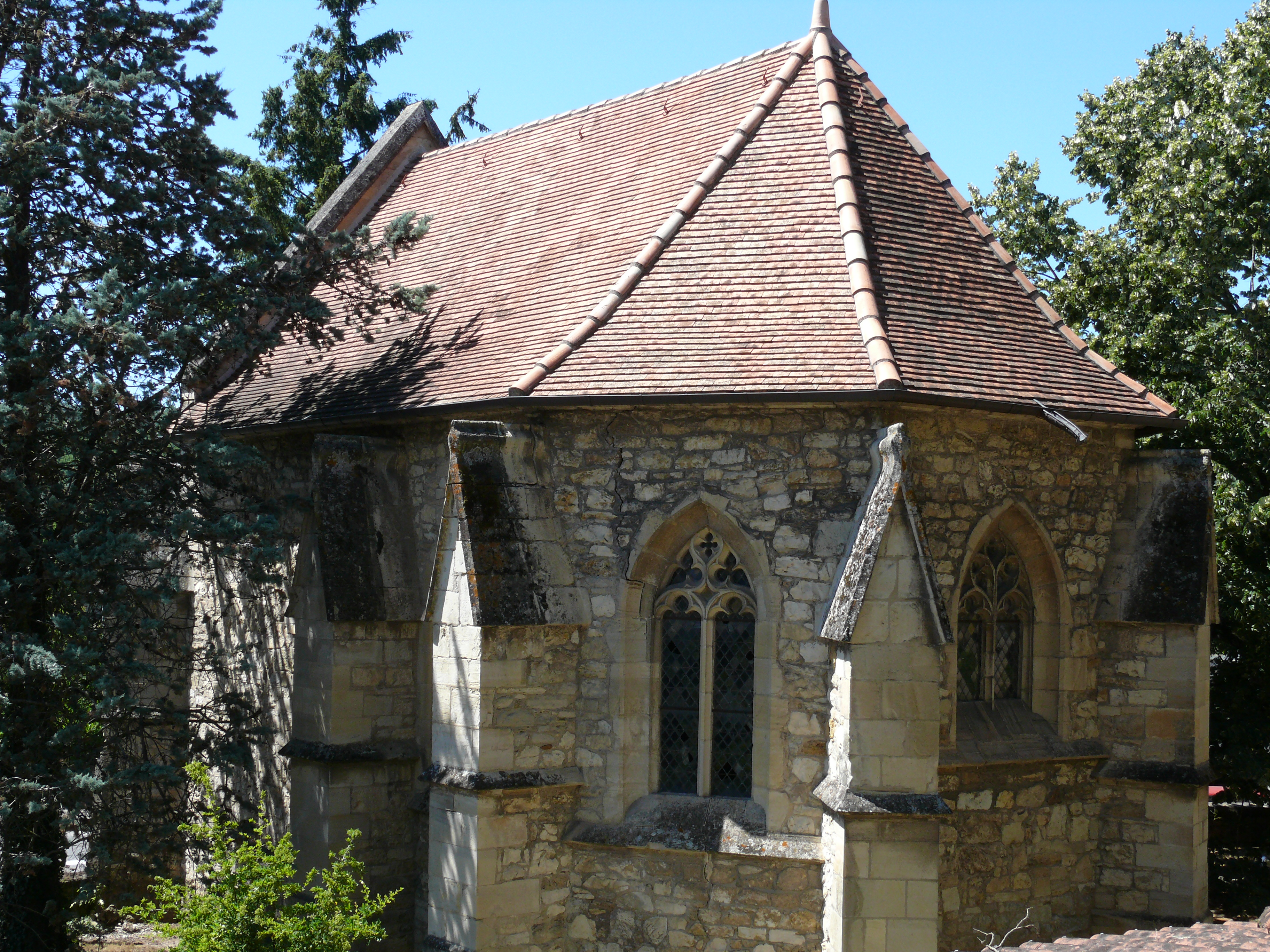 Villefranche-de-Rouergue - Chartreuse Saint-Sauveur - Chapelle des Etrangers